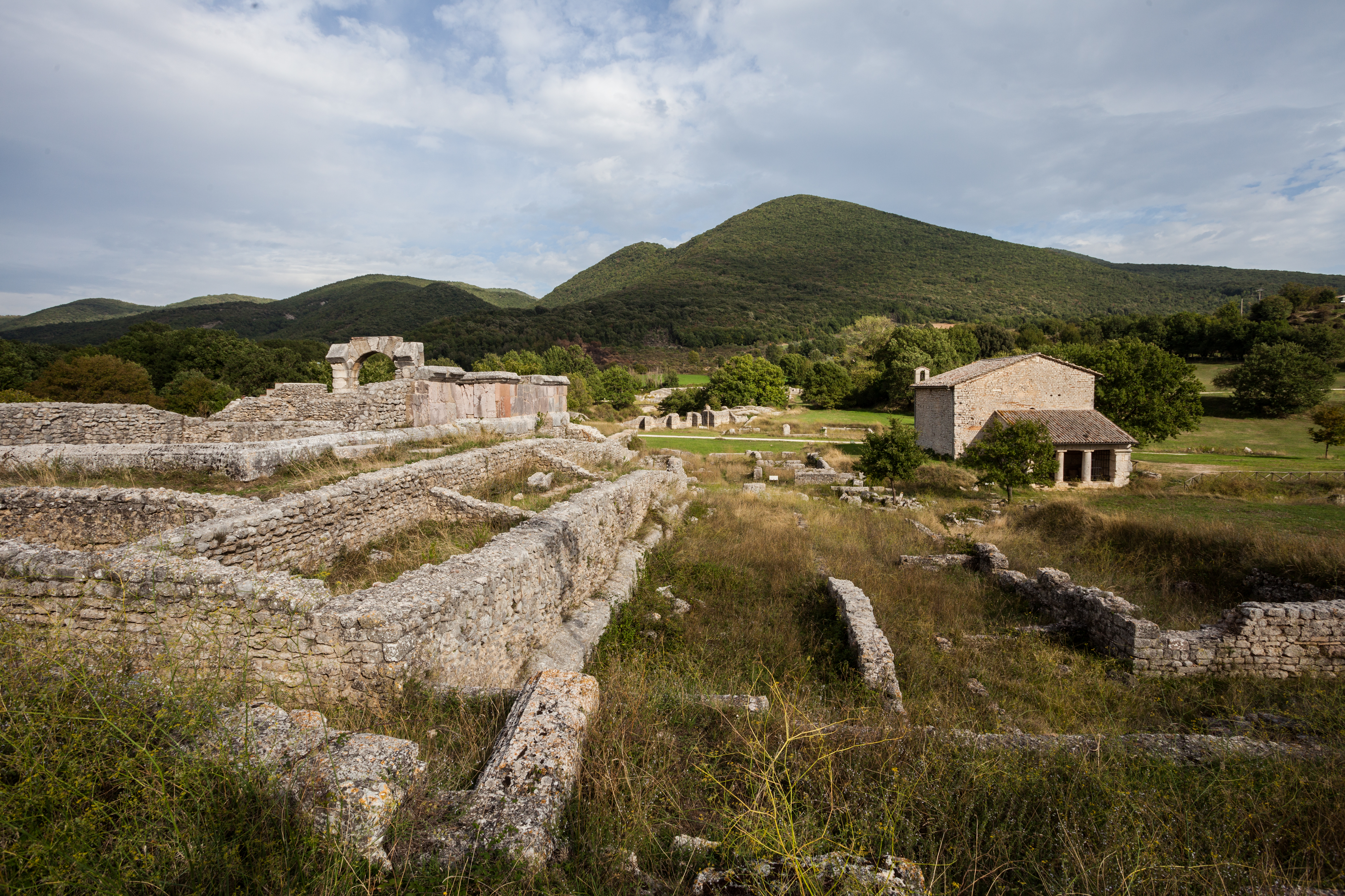 Area Archeologica di Carsulae - MIBAC This is a photo of a monument which is part of cultural heritage of Italy.